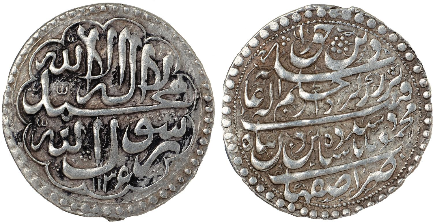 سکه ده شاهی محمود هوتکی